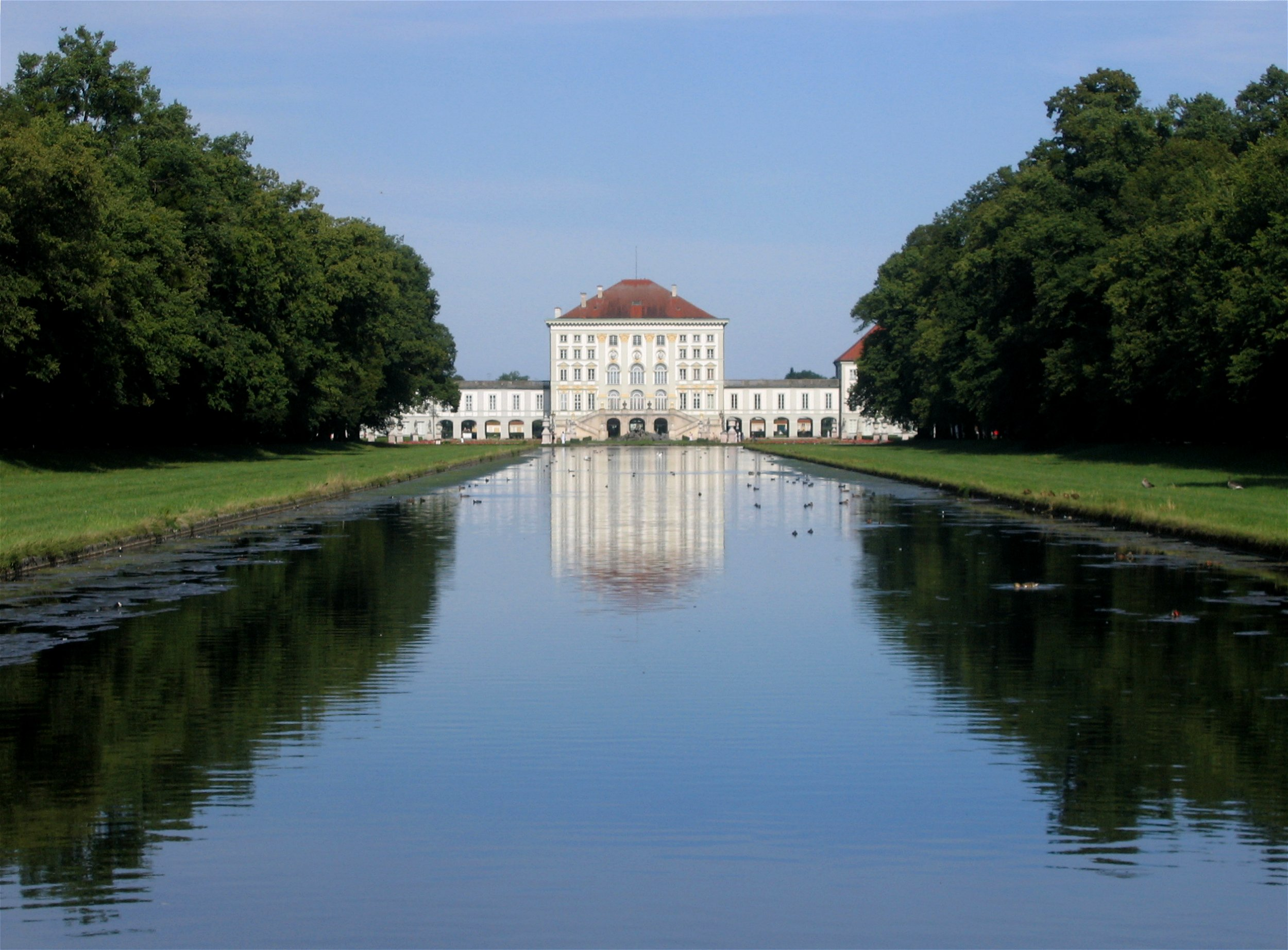 Schlosspark Nymphenburg, München: Blick vom Mittelkanal auf das Schloss